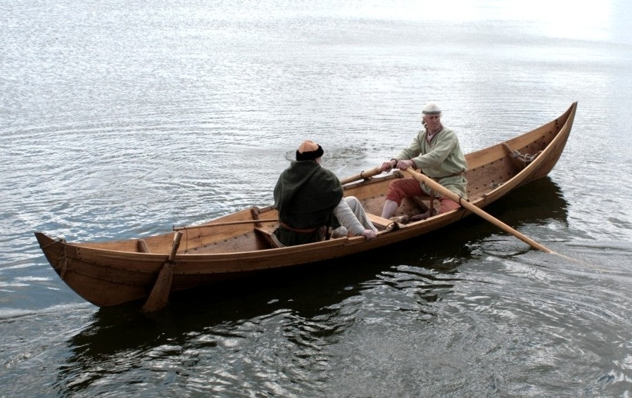 Wikinger Museum Haithabu - Wikinger Ruderboot Nökkvi während seiner Jungfernfahrt auf dem Haddebyer Noor bei den Wikinger Häuser in Haithabu.